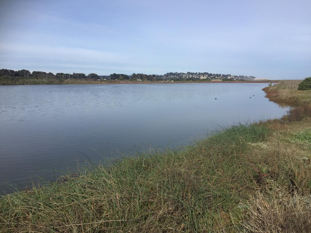 Cuerpo de agua del sector sur, de humedal Laguna Llolleo. Imagen tomada en Julio de 2020, agradecimiento a José Luis Brito Montero.